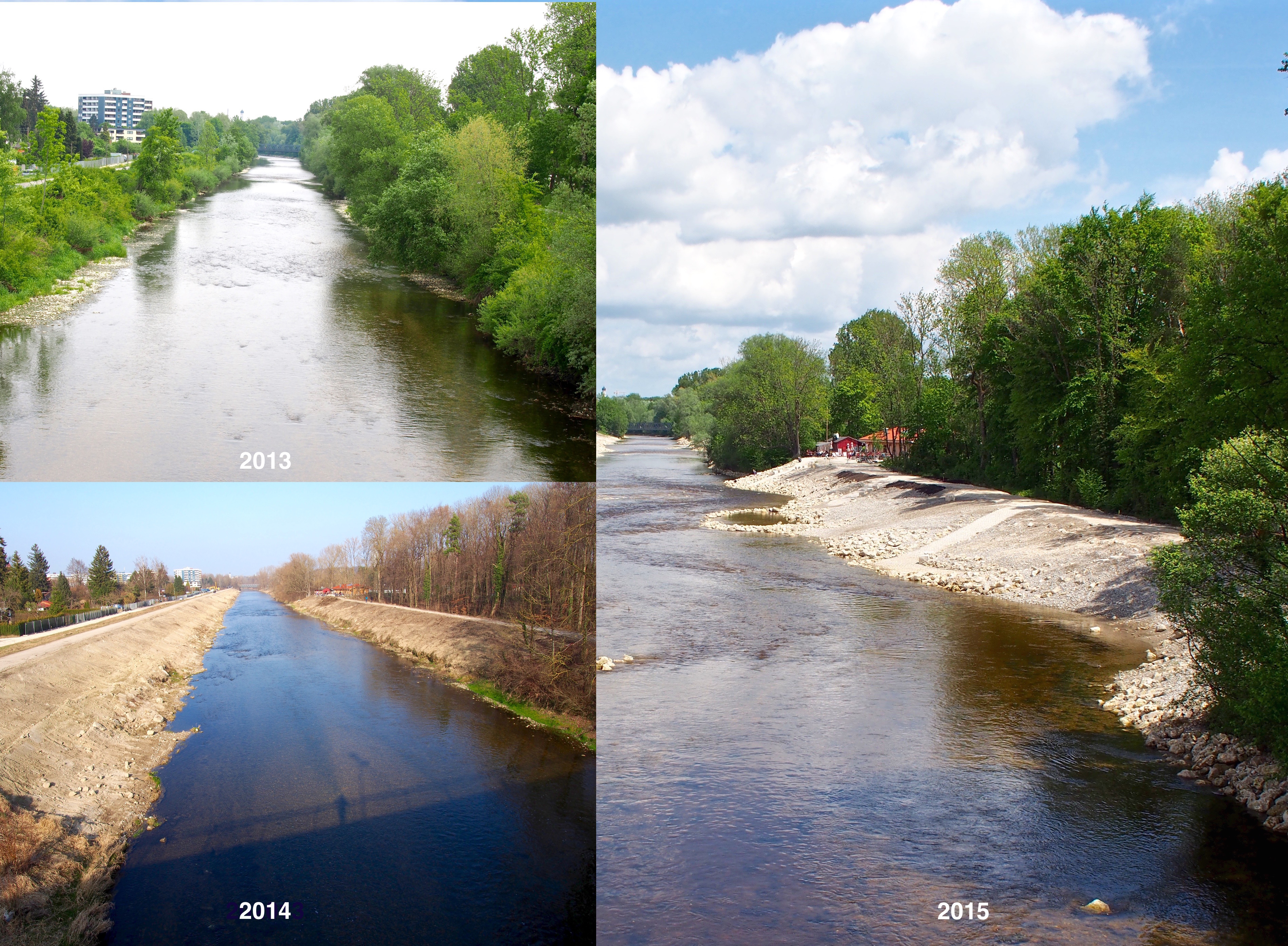 Augsburg: Wertachufer des Gögginger Wäldchens zwischen B 17 und Kulperhütte; Vergleich 2013 bis 2015 kurz vor dem Abschluss der Baumaßnahmen im Rahmen des Programms "Wertach Vital": Hochwasserschutz und Renaturierung im Stadtgebiet durch Flußverbreiterung, Abflachung der Uferböschung, Rückverlegung des Deichs und Ausbau des Ufers zur Naherholung im Landschaftsschutzgebiet Gögginger Wäldchen.